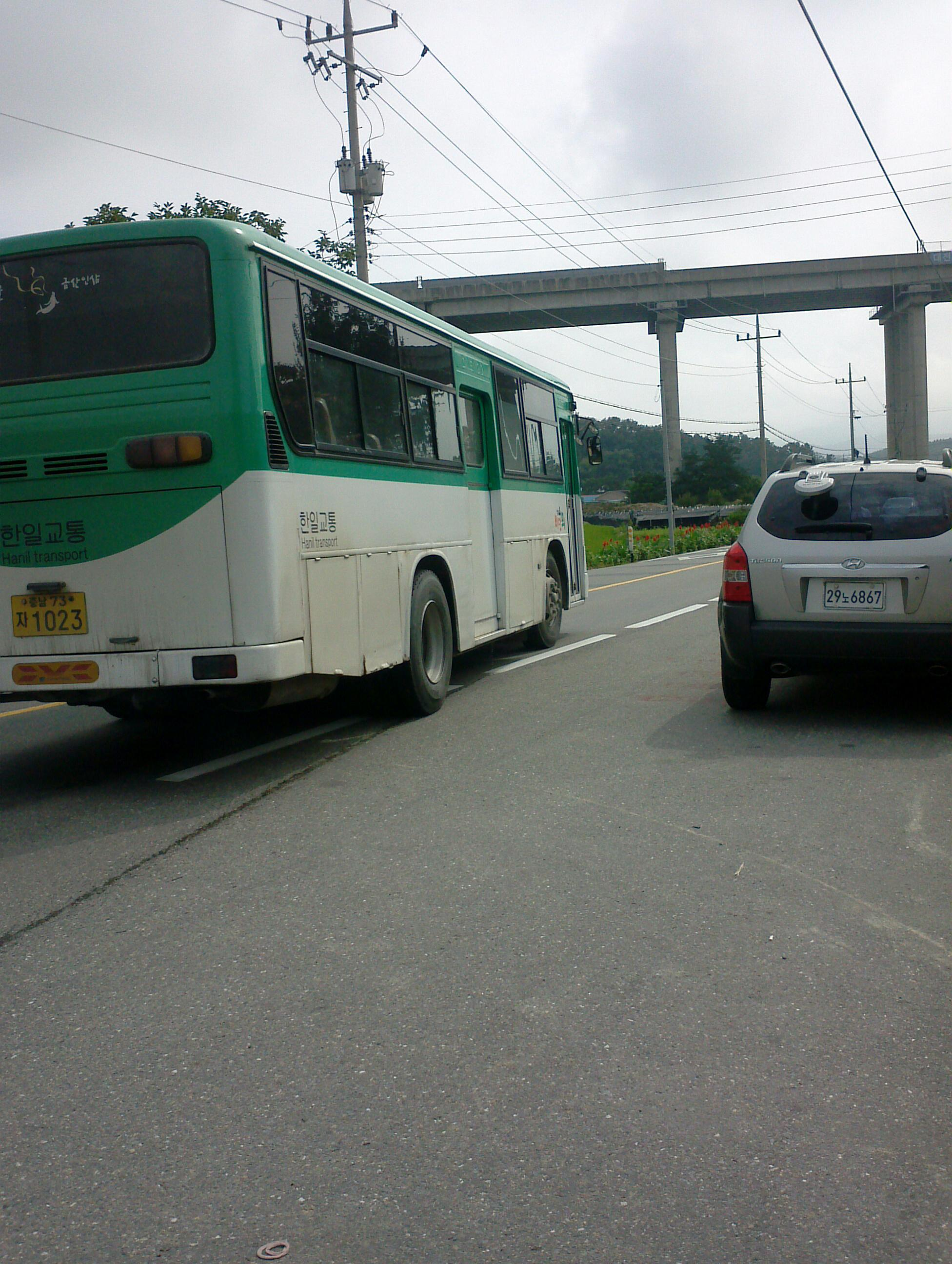 마치 경기도 버스모습과 흡사하다